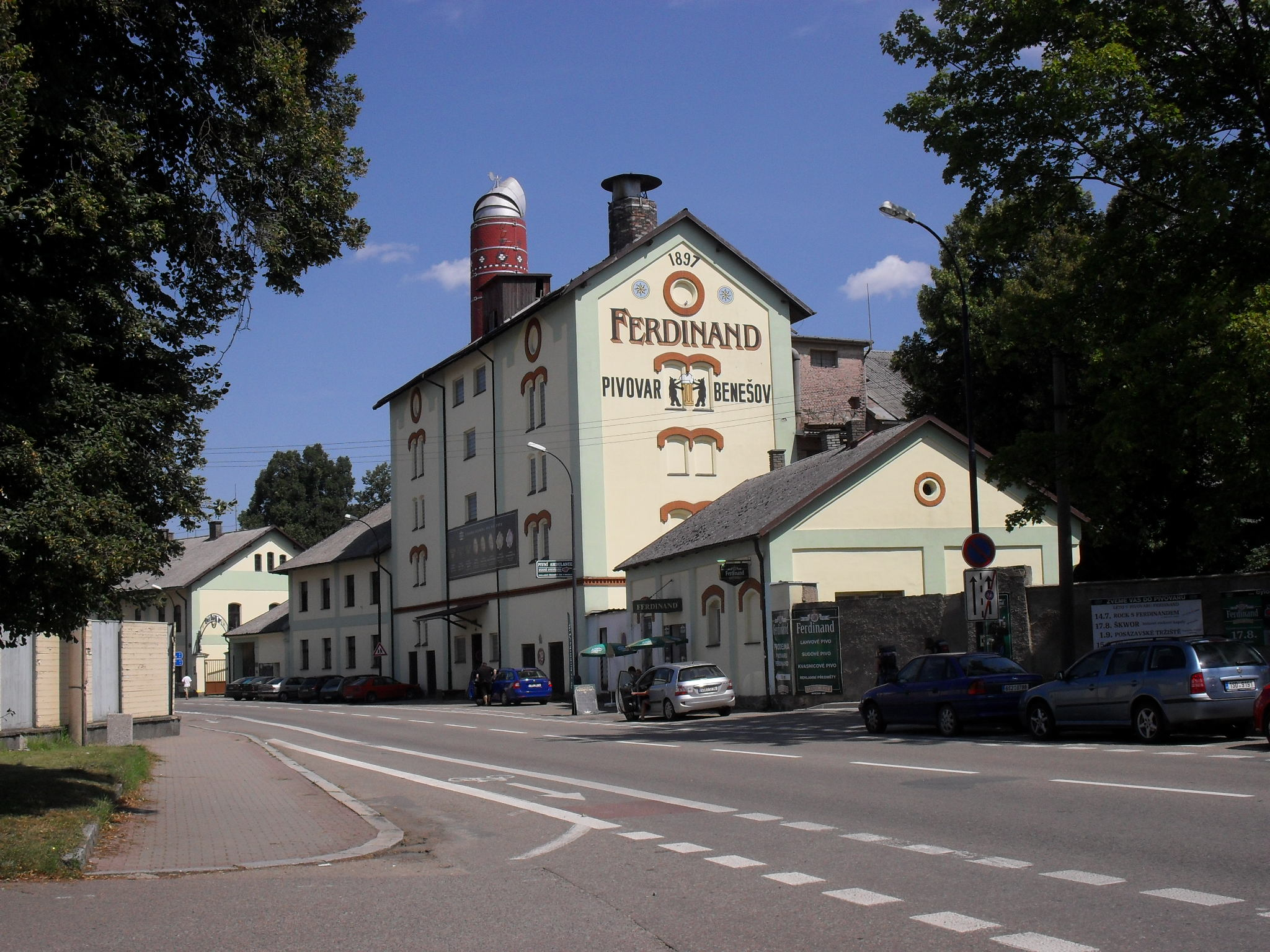 Budova pivovaru Ferdinand v Benešově